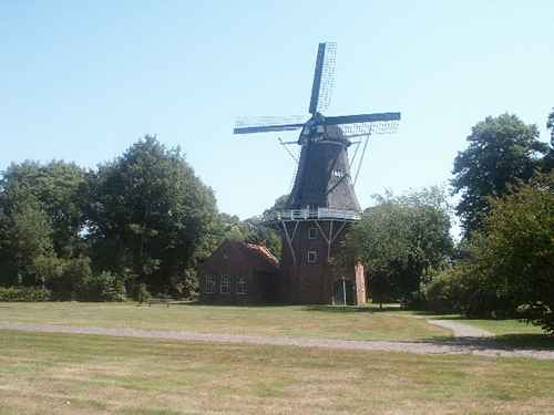 Gieten korenmolen "Hazewind"